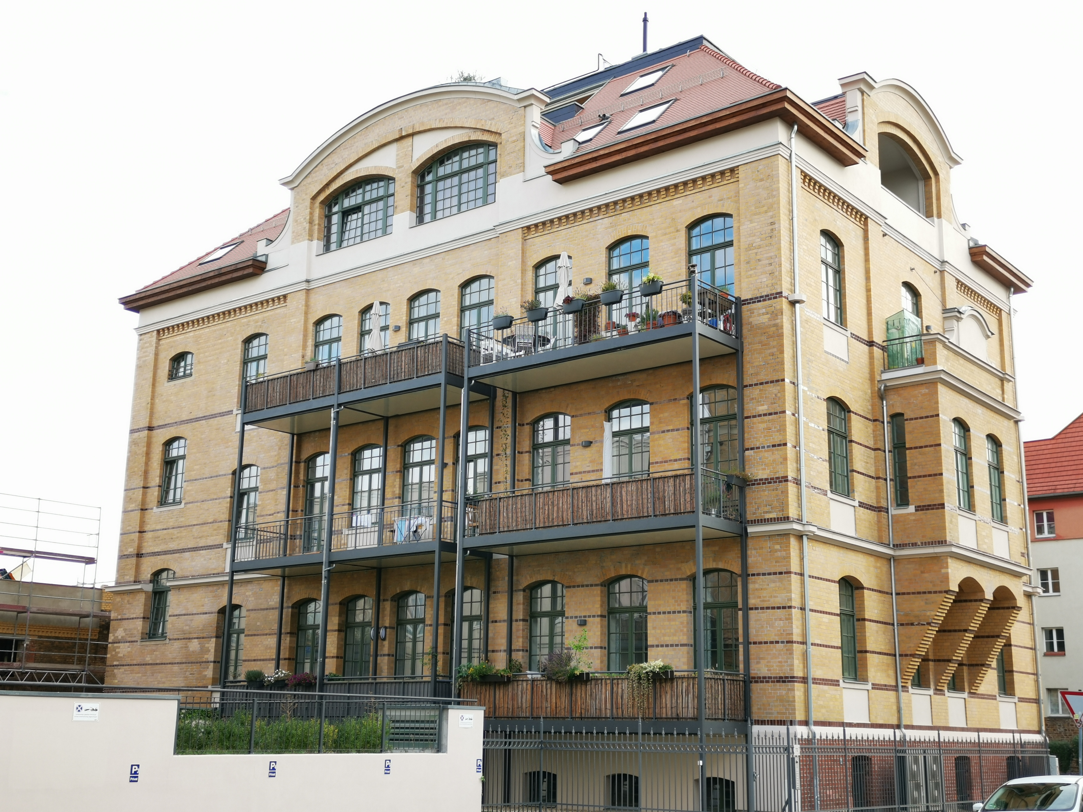 Nebengebäude der Globuswerke in der Limburger Straße